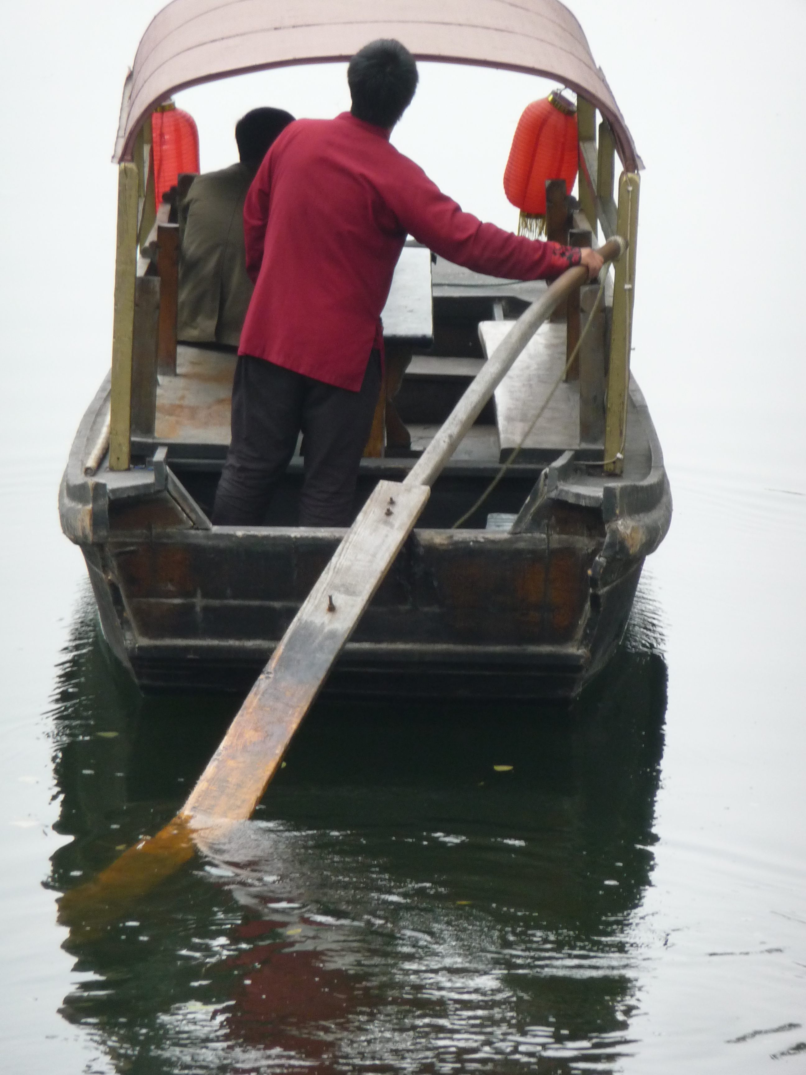 Wriggen in China